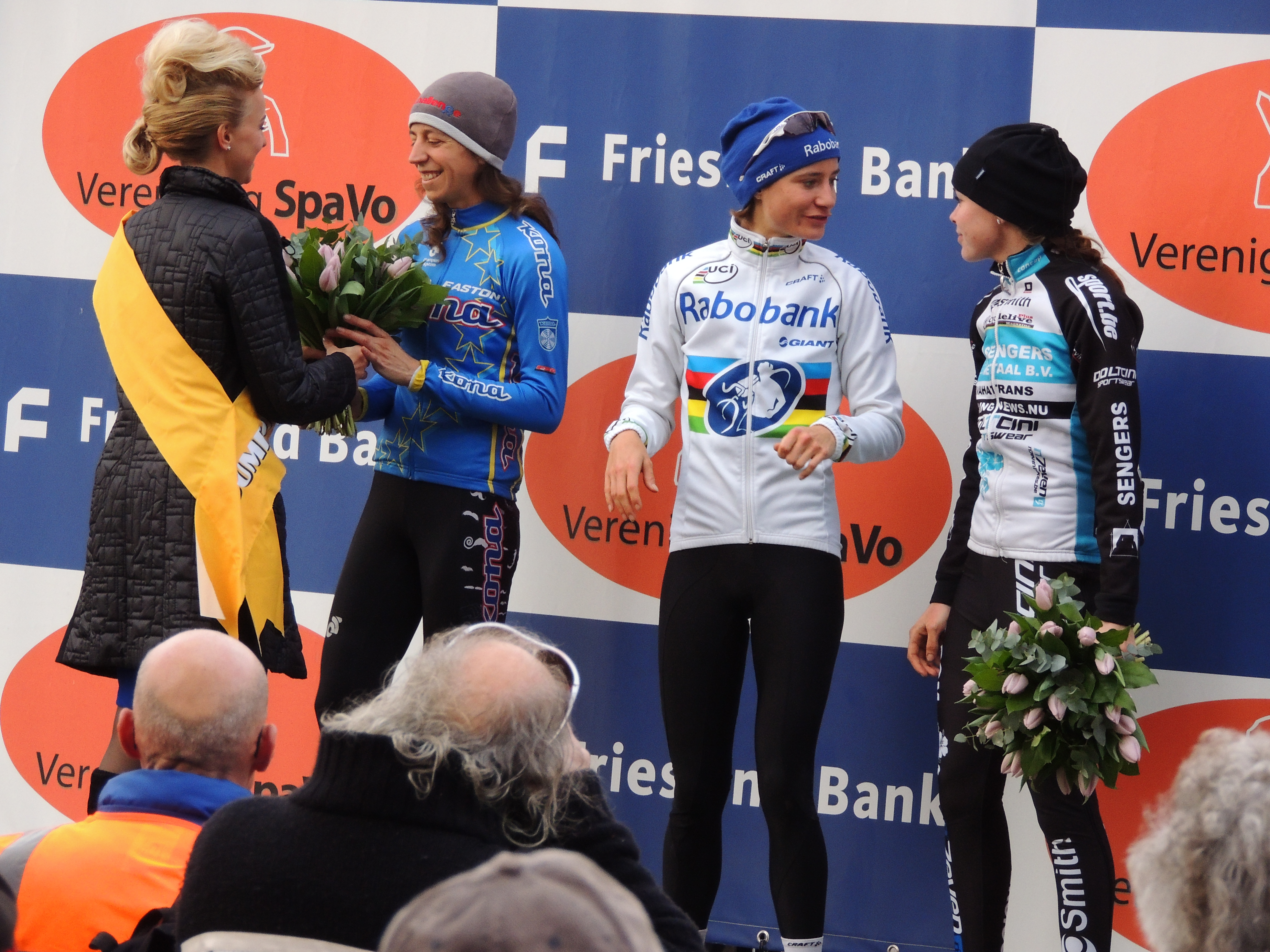 Bloemen voor de winnaars in Surhuisterveen 2013